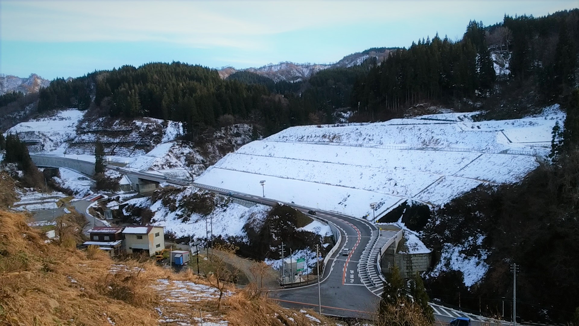 八箇インター全景